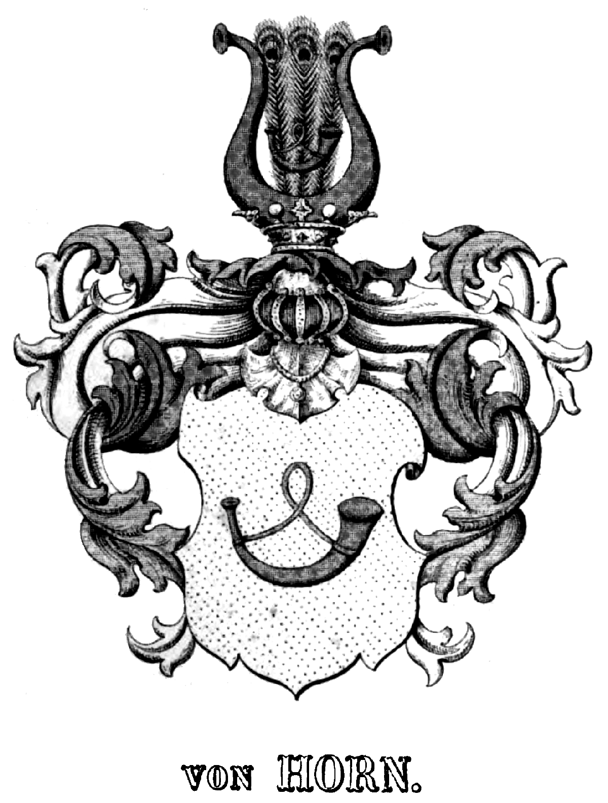 Wappen derer von Horn auf Ranzin